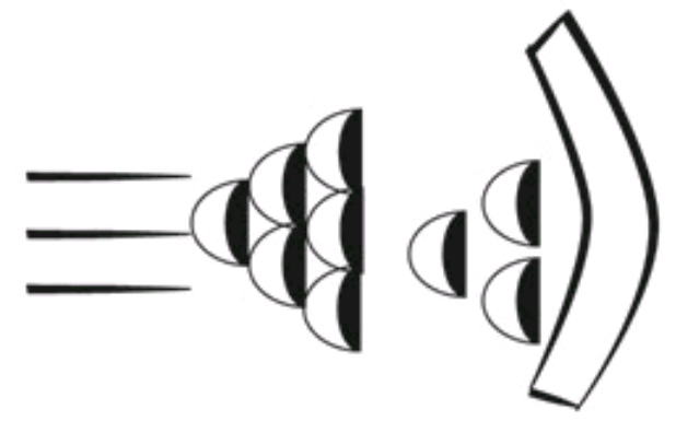 Írásjel az uruki archaikus szövegekből: Aratta